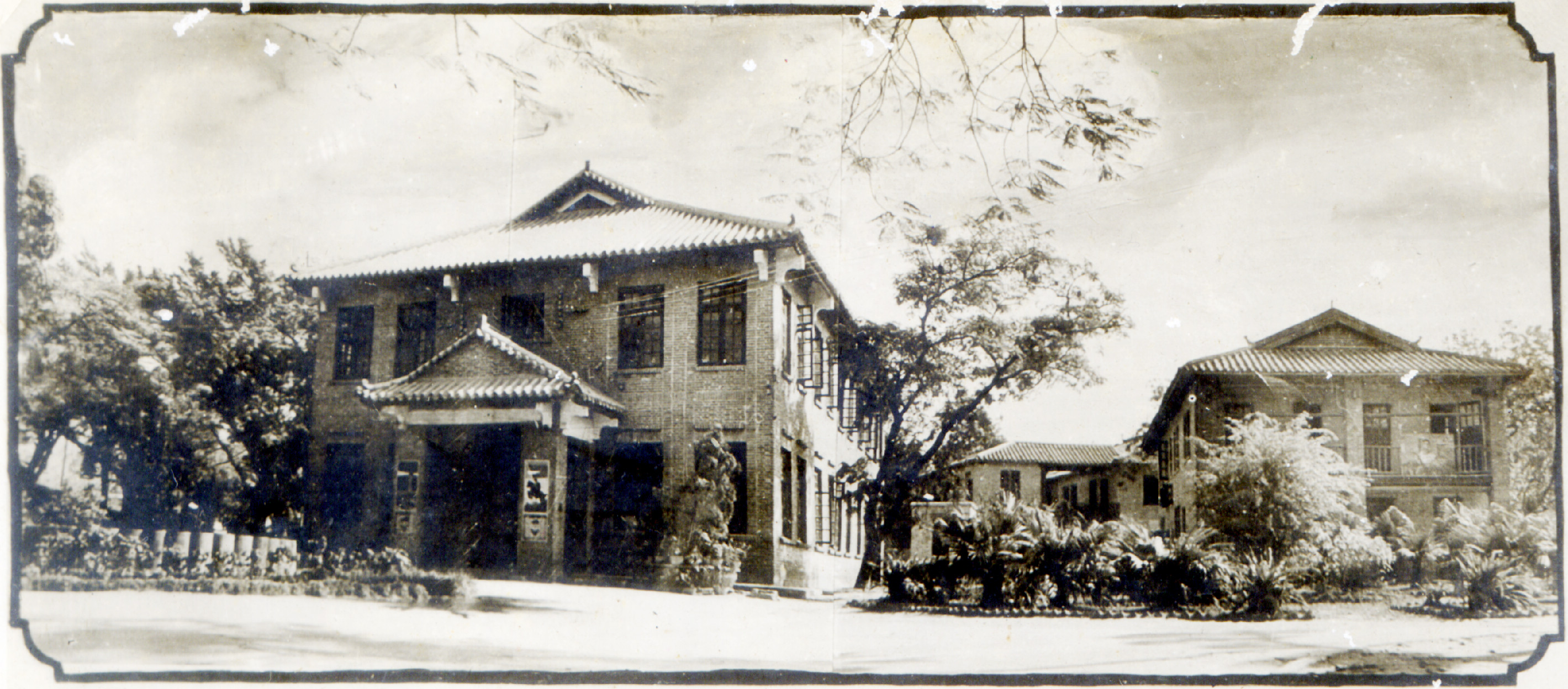 一师时期的协和堂